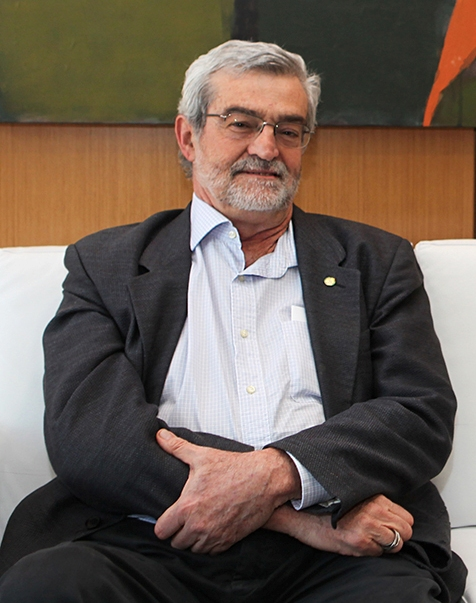 Deputado Pedro Eugênio - PT / PE. Foto: Elisabete Alves/Ministério da Cultura